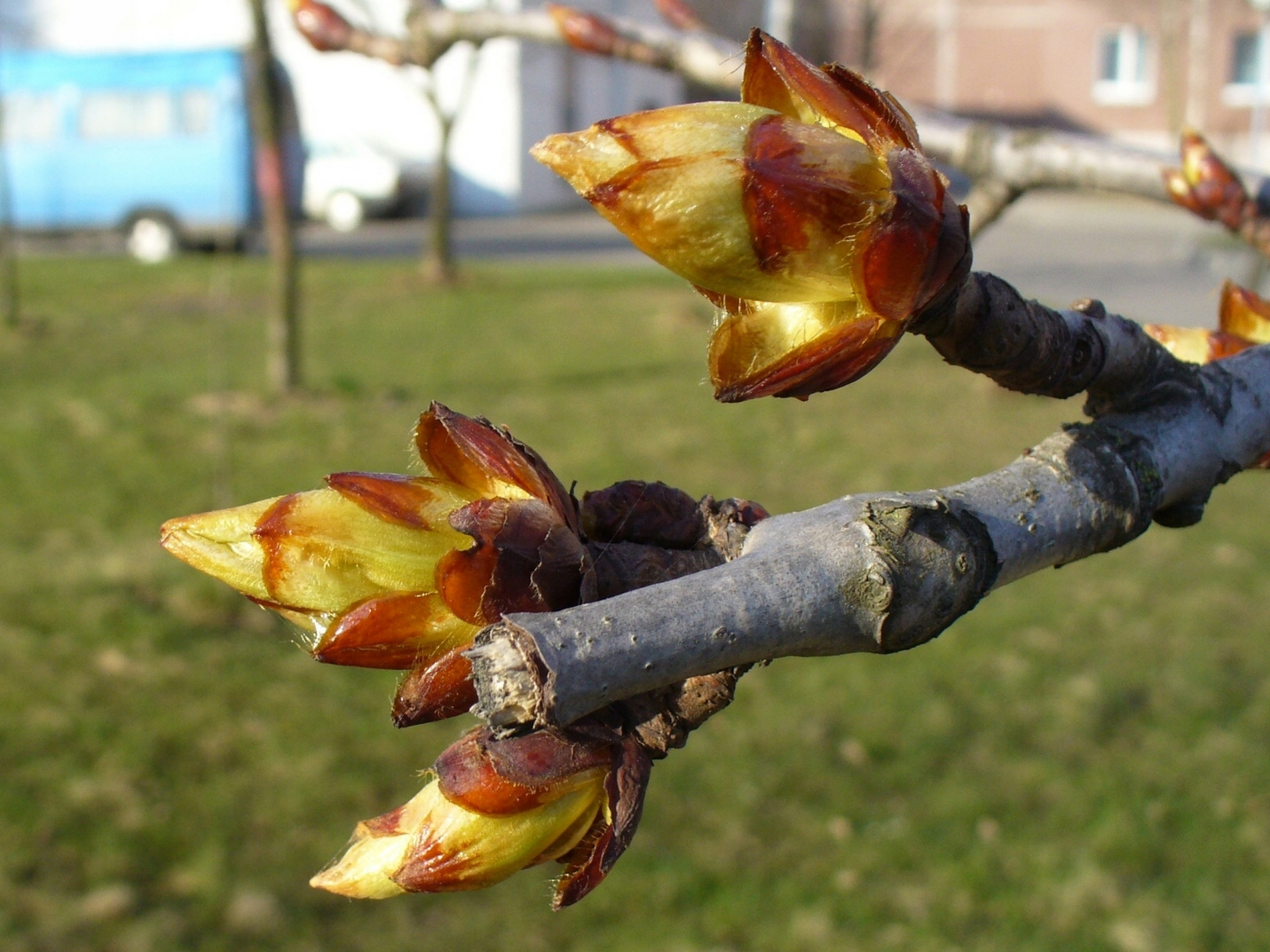 Почки каштана конского (Aesculus hippocastanum L.)